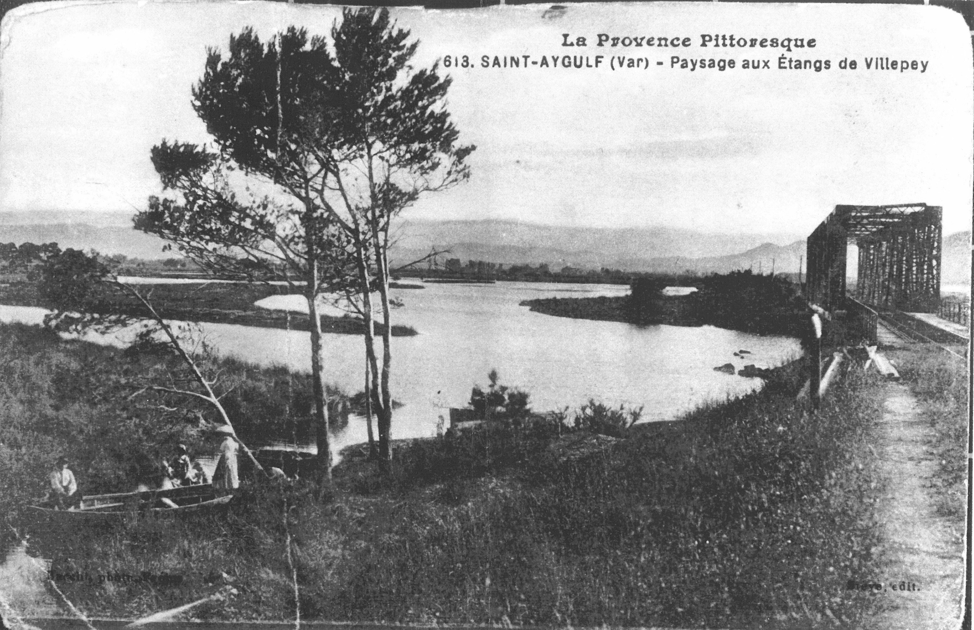 La lagune de Villepey et le pont ferroviaire de la ligne côtière des Chemins de fer de Provence, circa 1900